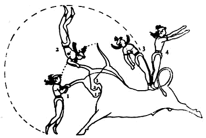 Stierspringen in Kreta. Rekonstruktionszeichnung Sir Arthur Evans’ nach einem Fresko aus dem Palast von Knossos. Schema eines Akrobatenspungs in vier Phasen: 1 Der Artist hat den Stier bei den Hörnern gepackt 2 Der Artist wird von den Hörnern hochgeschleudert 3 Der Artist landet nach dem Salto auf dem Stierrücken 4 Der Artist springt dem Fänger in die Arme